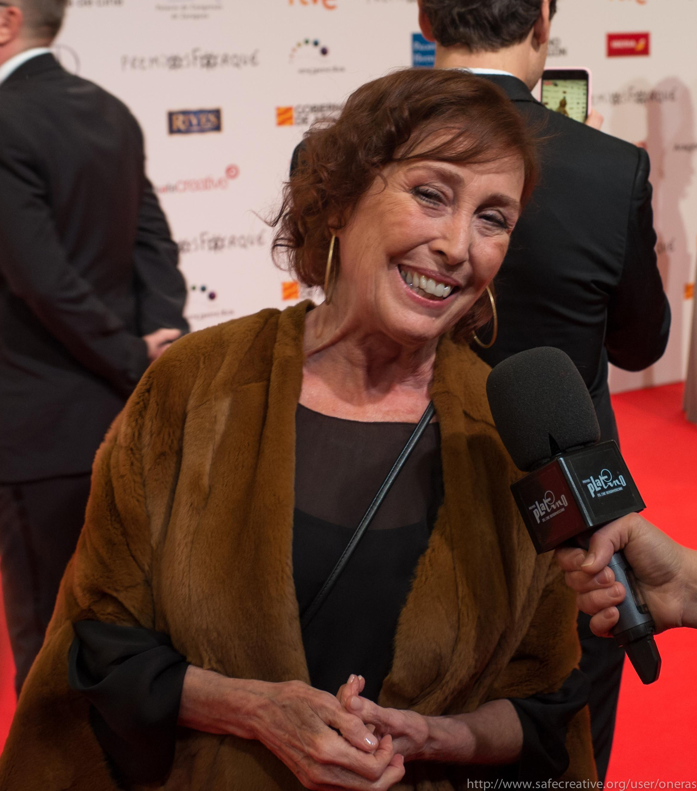 Verónica Forqué en la entrega de los premios Forqué, en 2018.